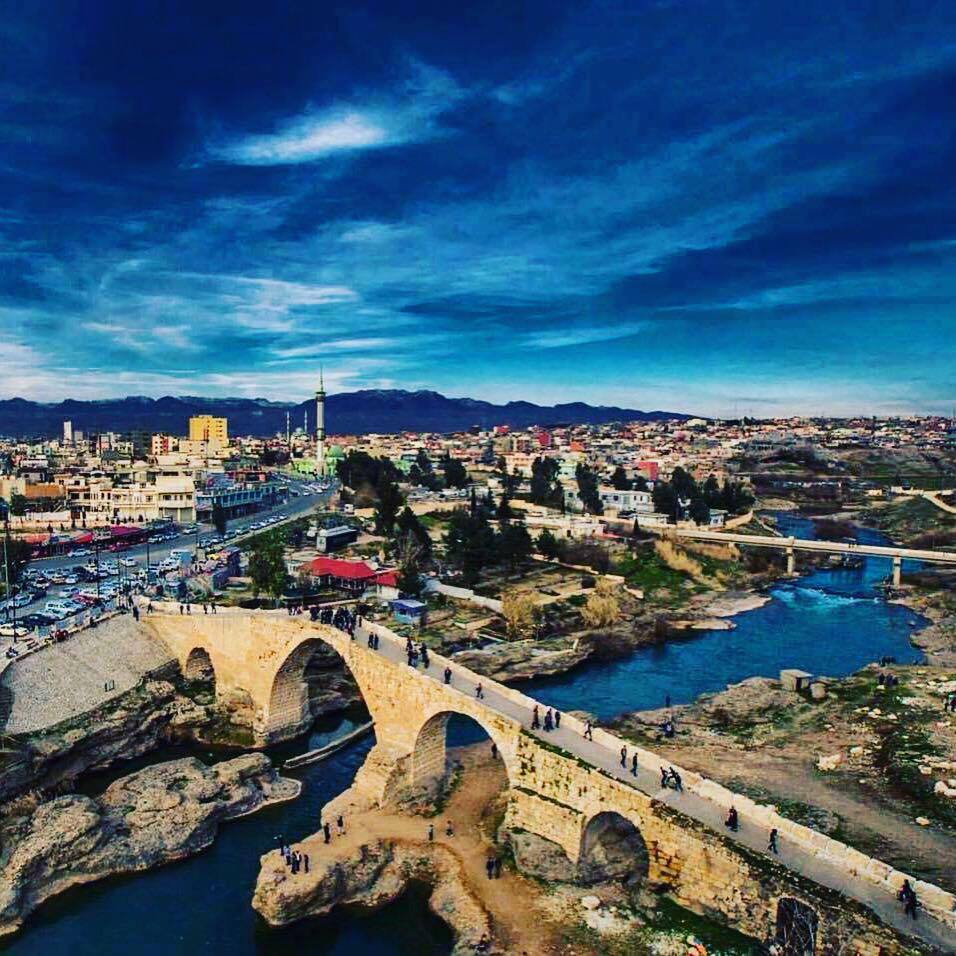 جسر دلال کوردی: بردي دلال Kurdî: Pira Delal